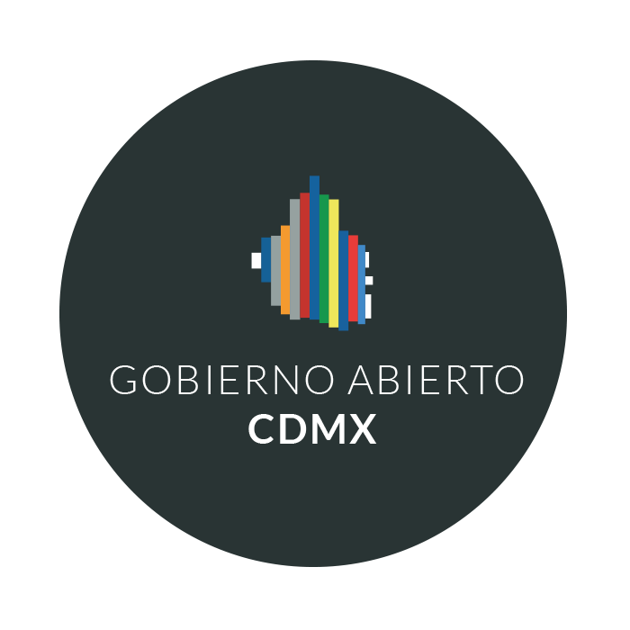 Logotipo de Gobierno Abierto Ciudad de México